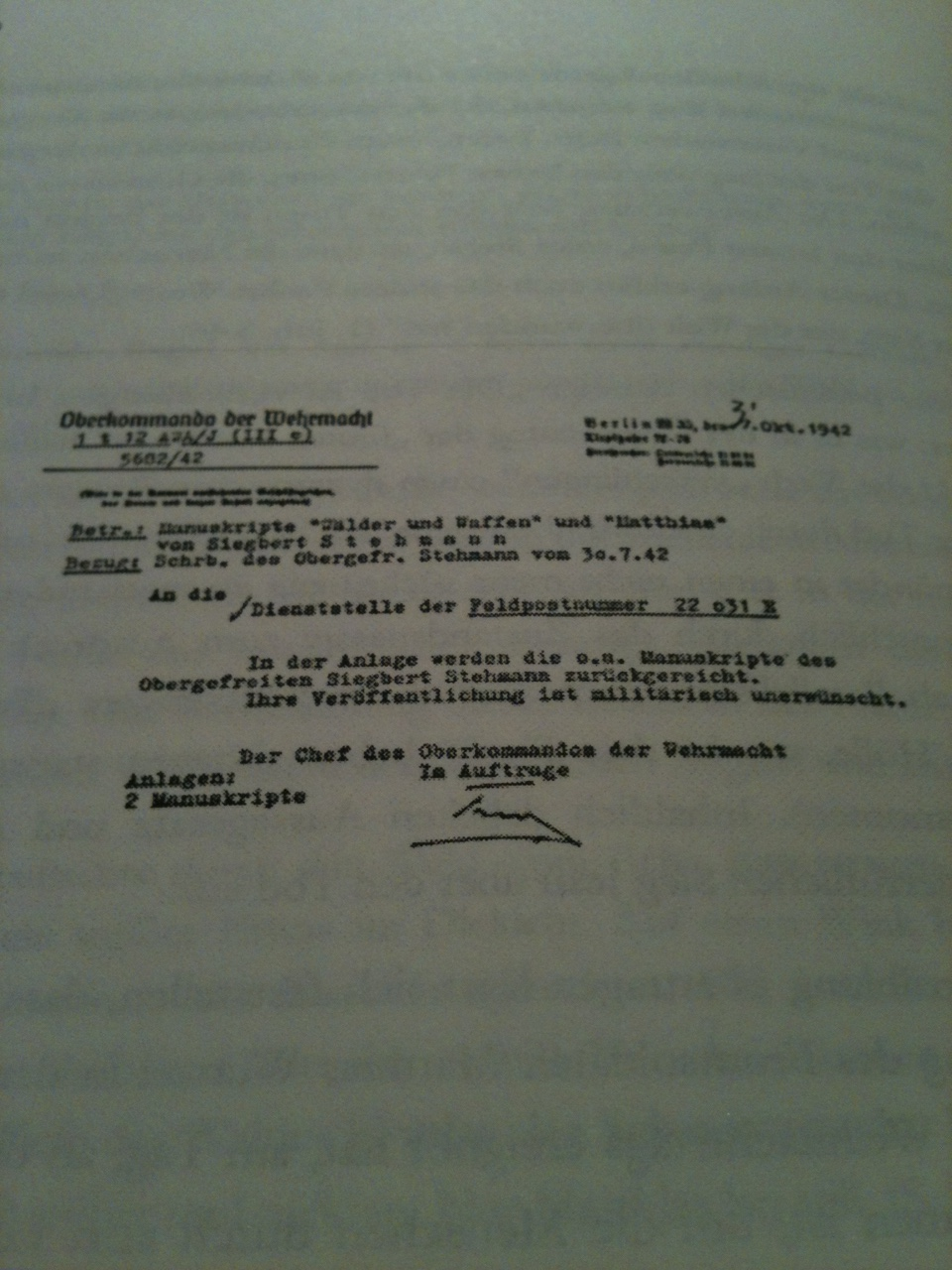 Veröffentlichungsverbot zweier Schriften des Pfarrers Siegbert Stehmann durch das Oberkommando der Wehrmacht, 1942